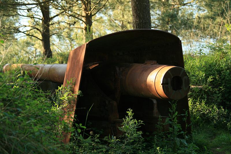 Cañón Munaiz-Argüelles 150/45 de tiro rápido. Ruinas del emplazamiento militar de Monteferro. Nigrán (Galicia, España) / Monteferro's military emplacement. Cannon Munaiz-Argüelles 150/45 of rapid shot. Ruins of Monteferro's military emplacement. Nigrán (Galicia, Spain)